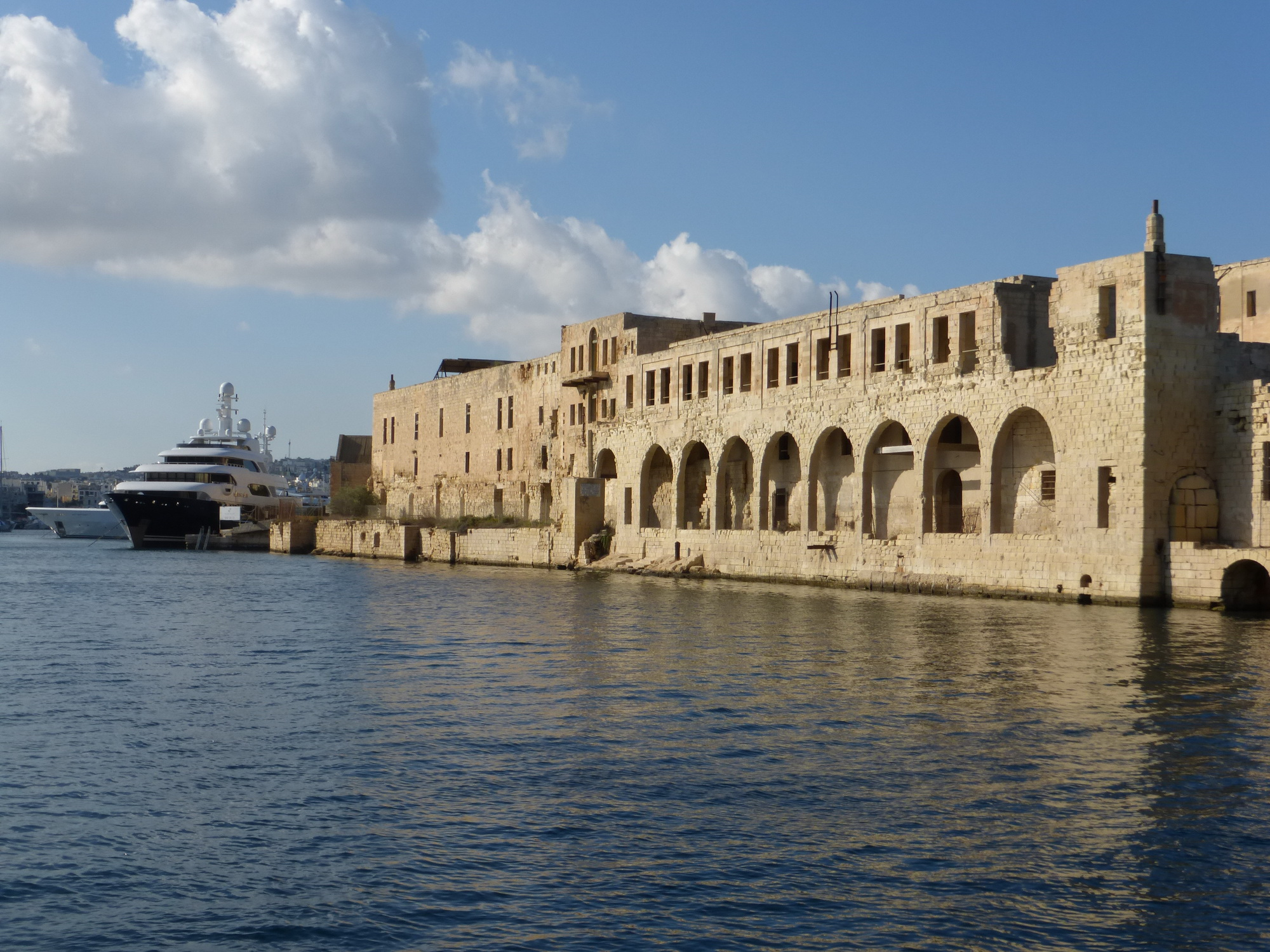 Ehemaliges Lazarett auf Manoel Island (Malta)